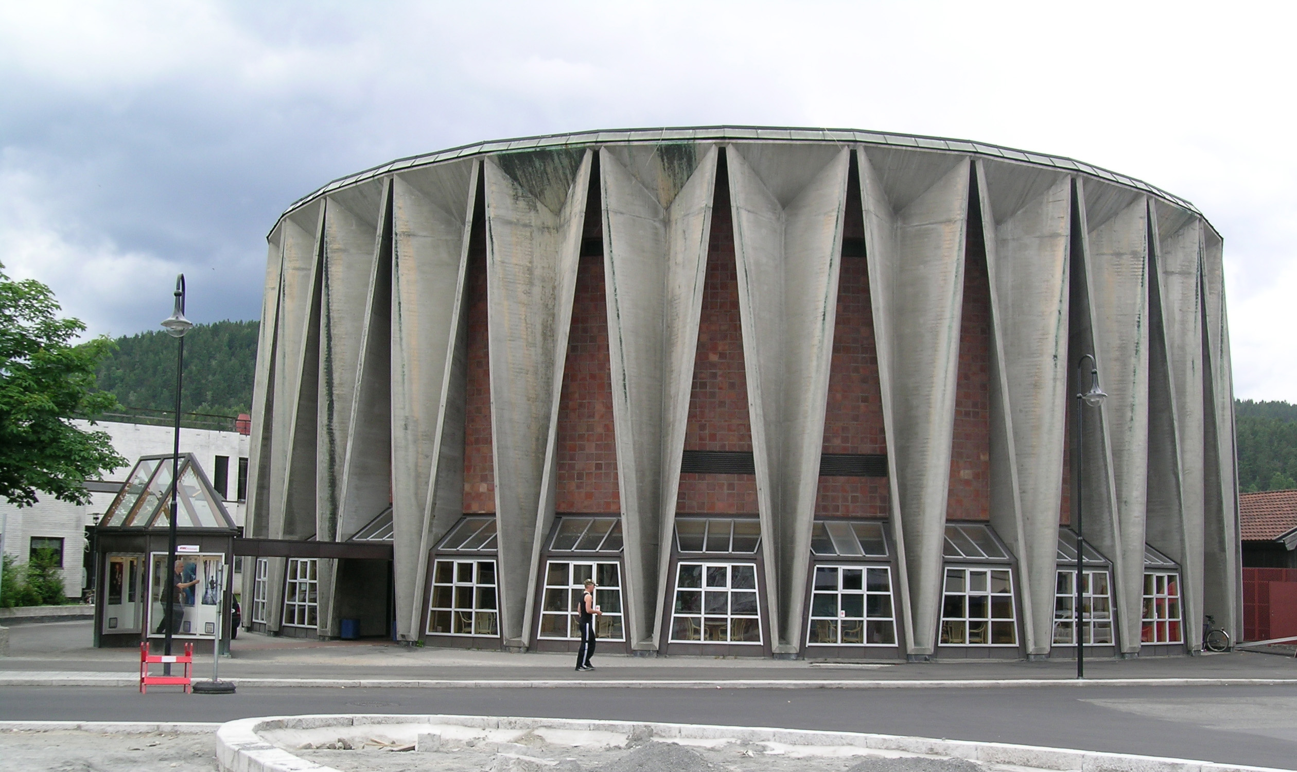 Kongsberg movie theatre from 1965. Architects Ørnulf Ljøterud and Erik Ødegård.